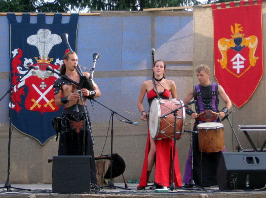 Беларуская (тарашкевіца): Выступ гурту «Irdorath» на сьвяткаваньні 600-годзьдзя Грунвальдзкай бітвы, Беларусь, Дудуткі. 31 ліпеня 2010 год